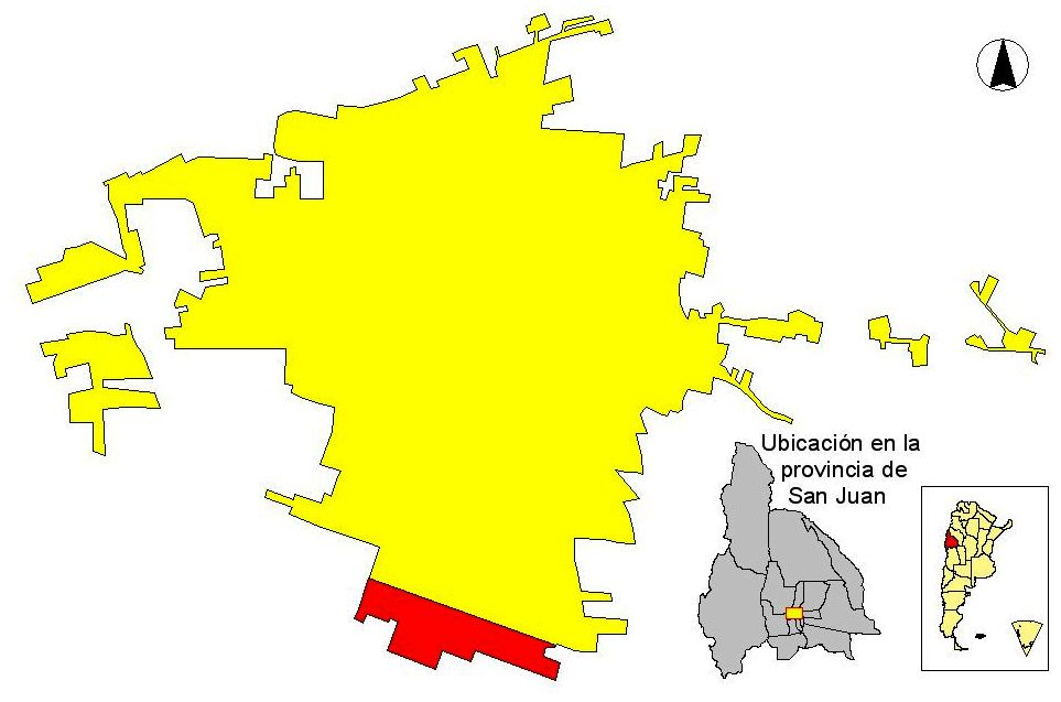 Mapa que representa la localizacón del Componente Villa Barbosa - Villa Nacusi en el área urbana del Gran San Juan, provincia de San Juan, Argentina